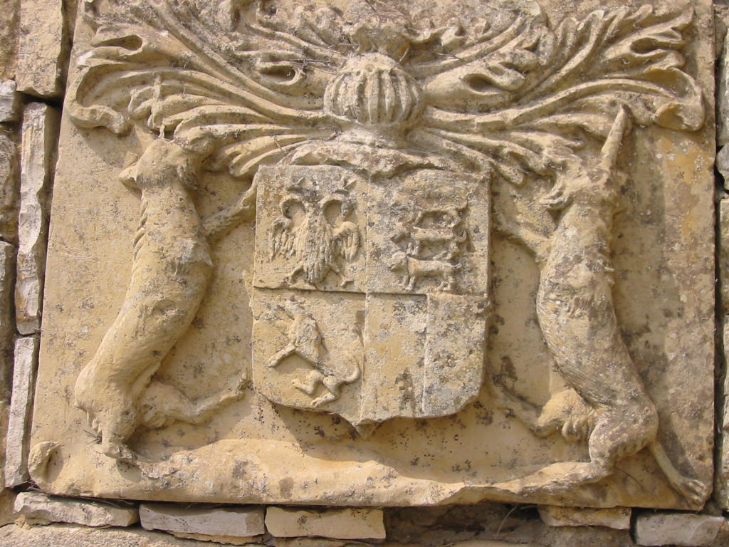 Armoiries placées au château de Pechrigal par monsieur Dreyfus